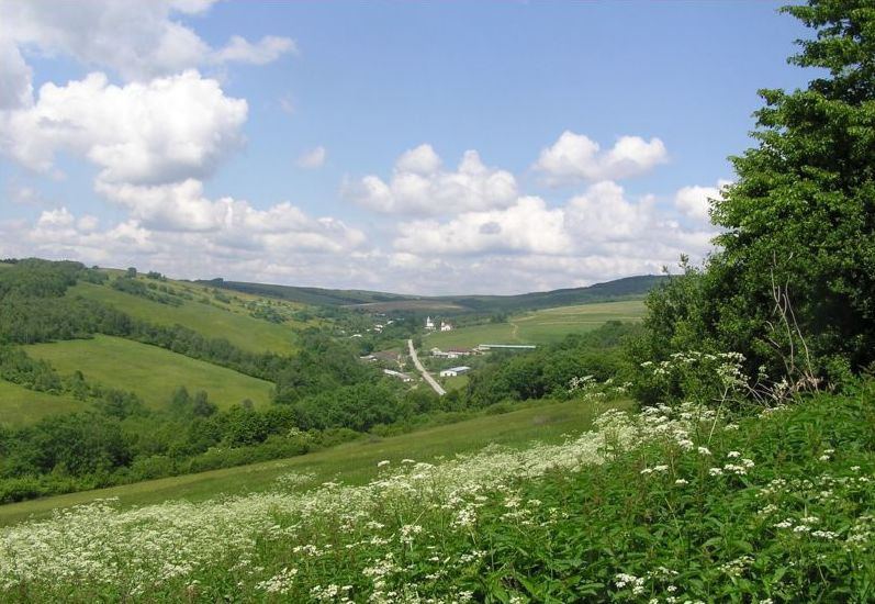 Celkový pohľad